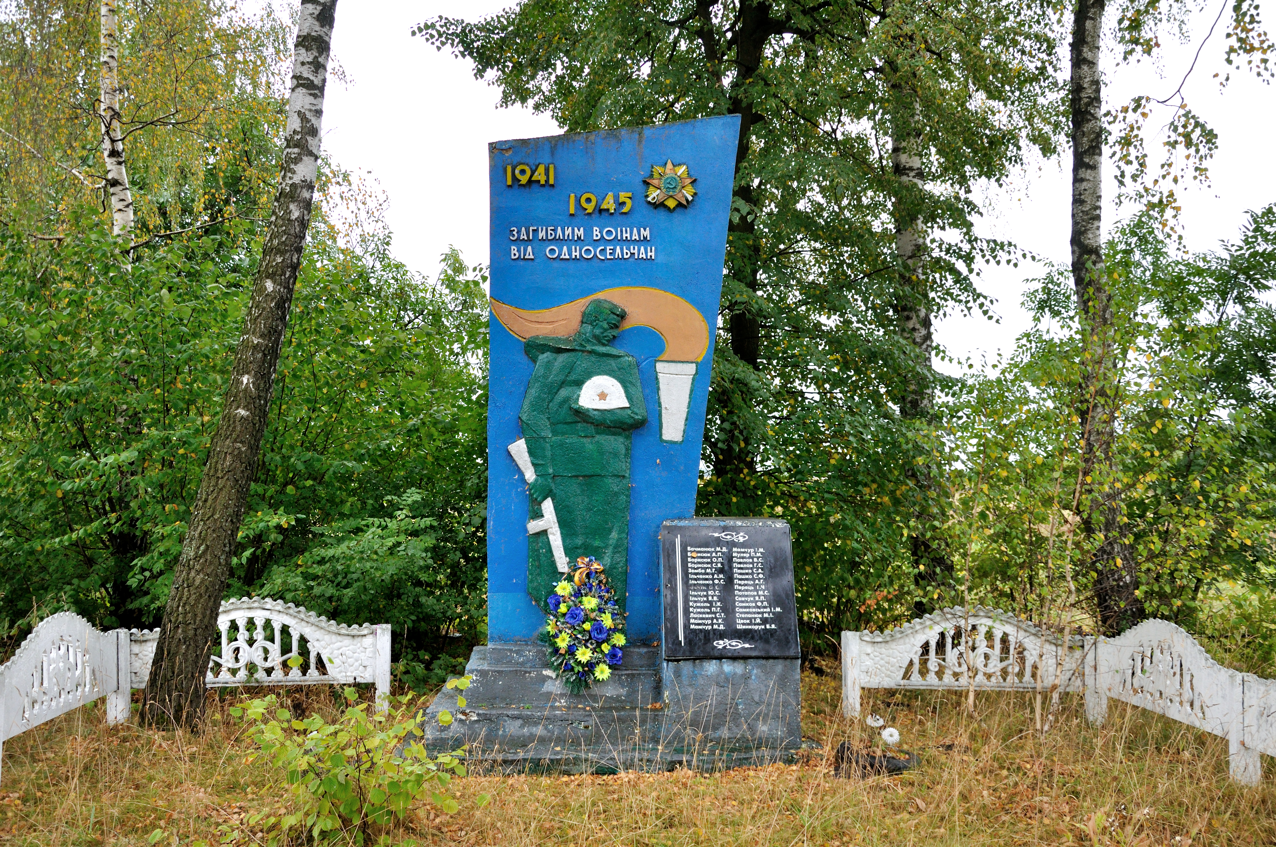 Пам’ятник воїнам-односельчанам, с. Пашуки